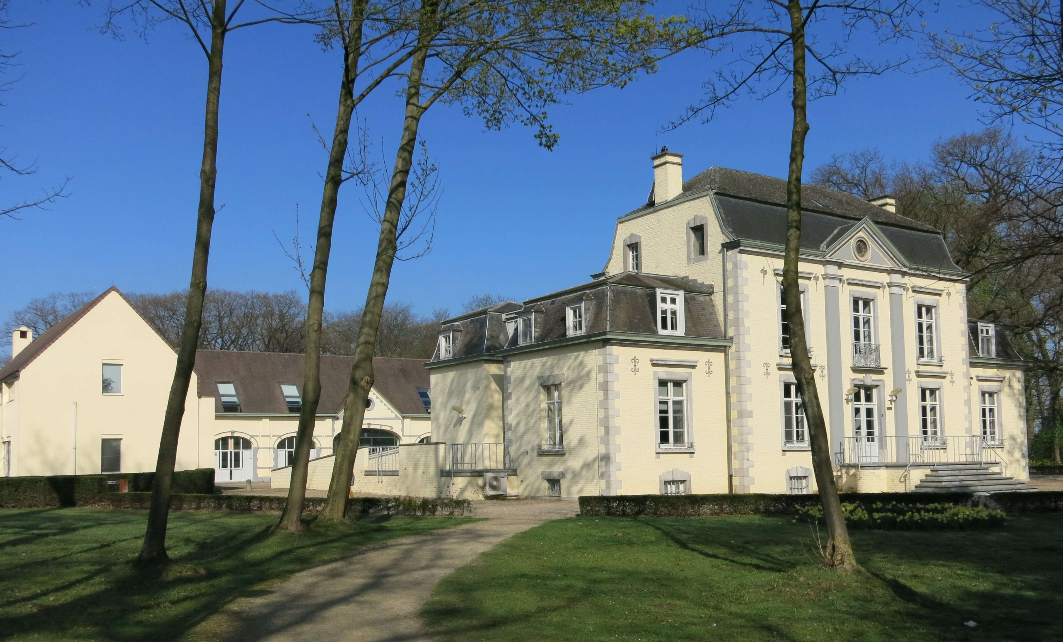 Kasteel Ter Motten Dilsen met koetshuis uit 1725. Tegenwoordig Bestuurscentrum en Administratief centrum van Dilsen-Stokkem (gemeentehuis).